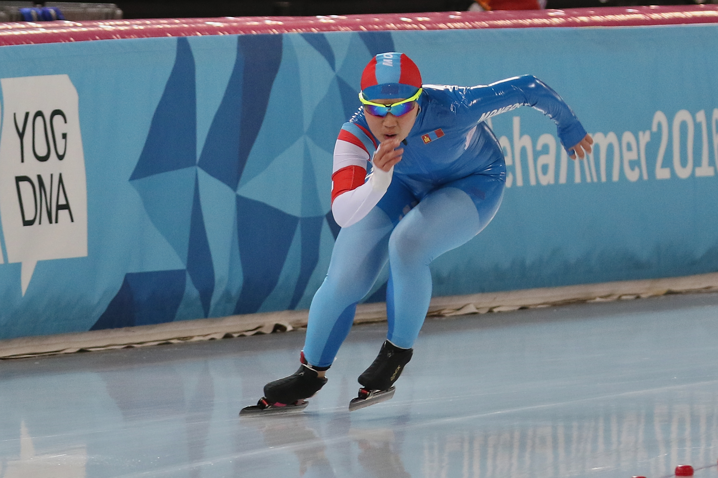 Lillehammer 2016 - Speed skating Ladies' 500m race 2 - Sumiya Buyantogtokh